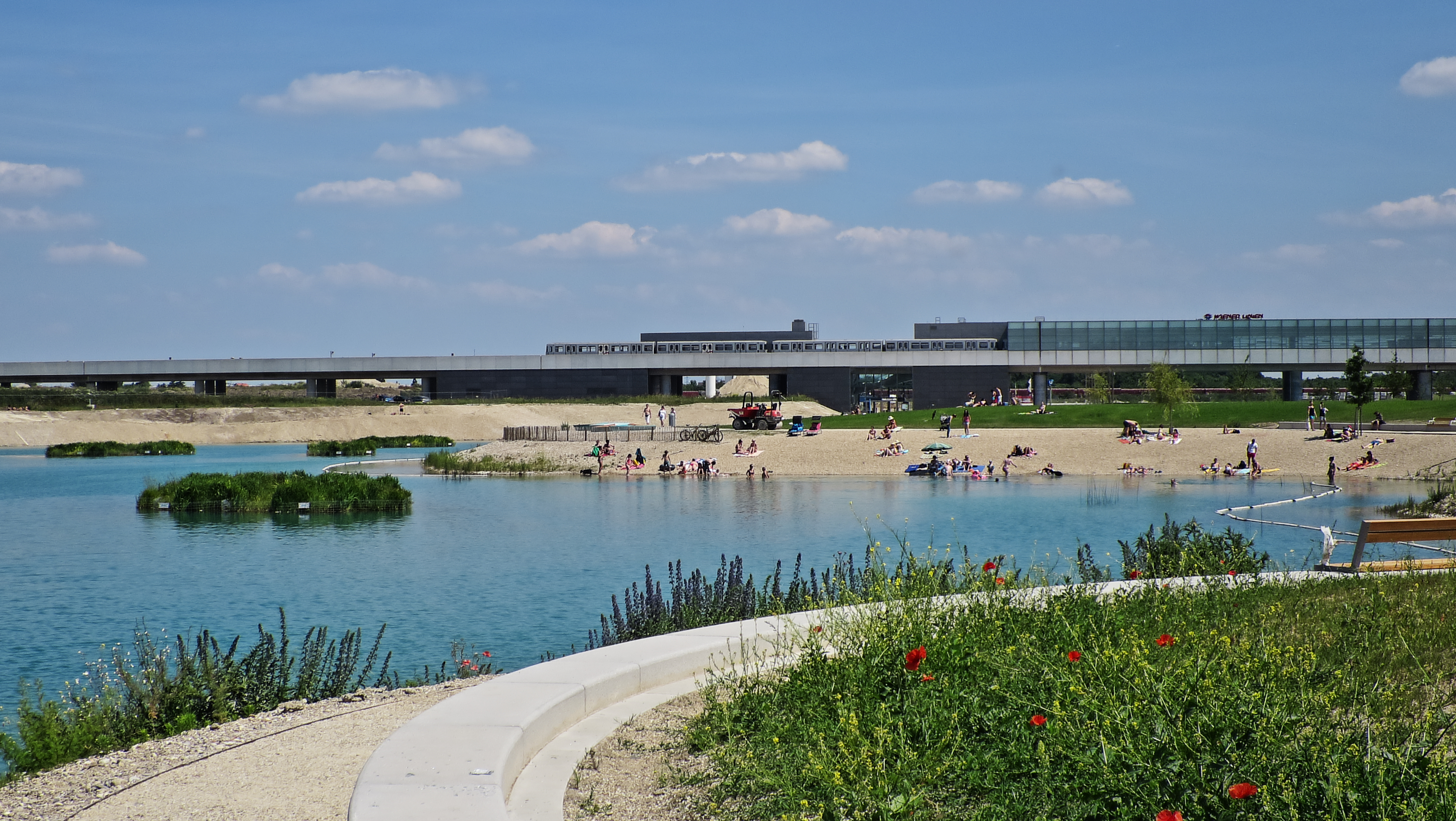 Wien, See im Zentrum der Seestadt Aspern